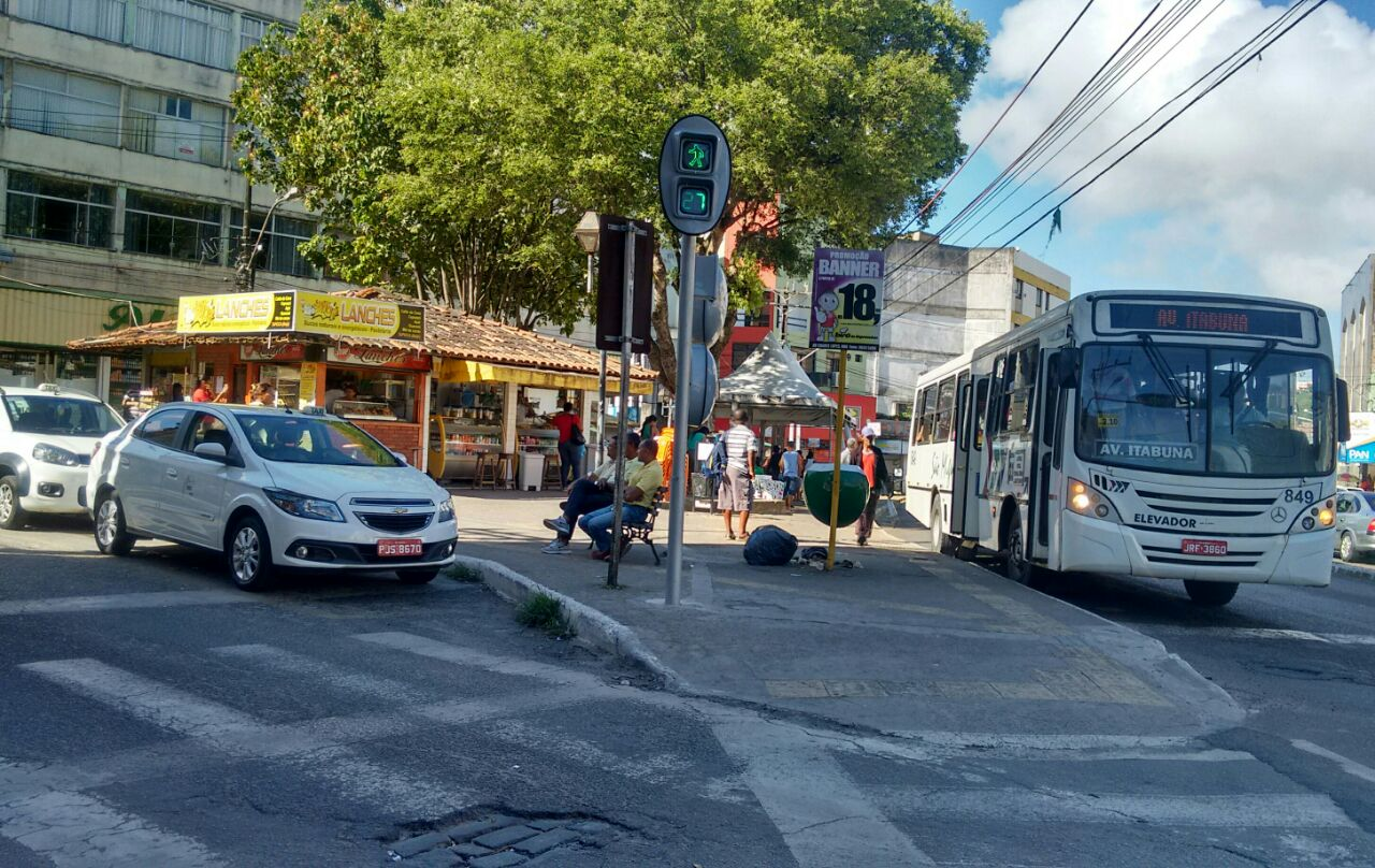 Praça Coronel Pessoal em 2017